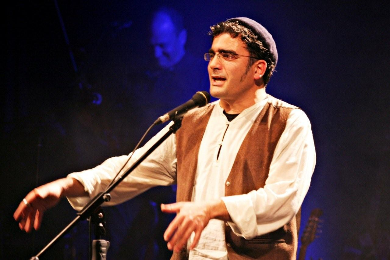 ג'קי לוי בהופעה מתוך המופע המשותף של ג'קי לוי וחנן יובל "גשר ההלכה"